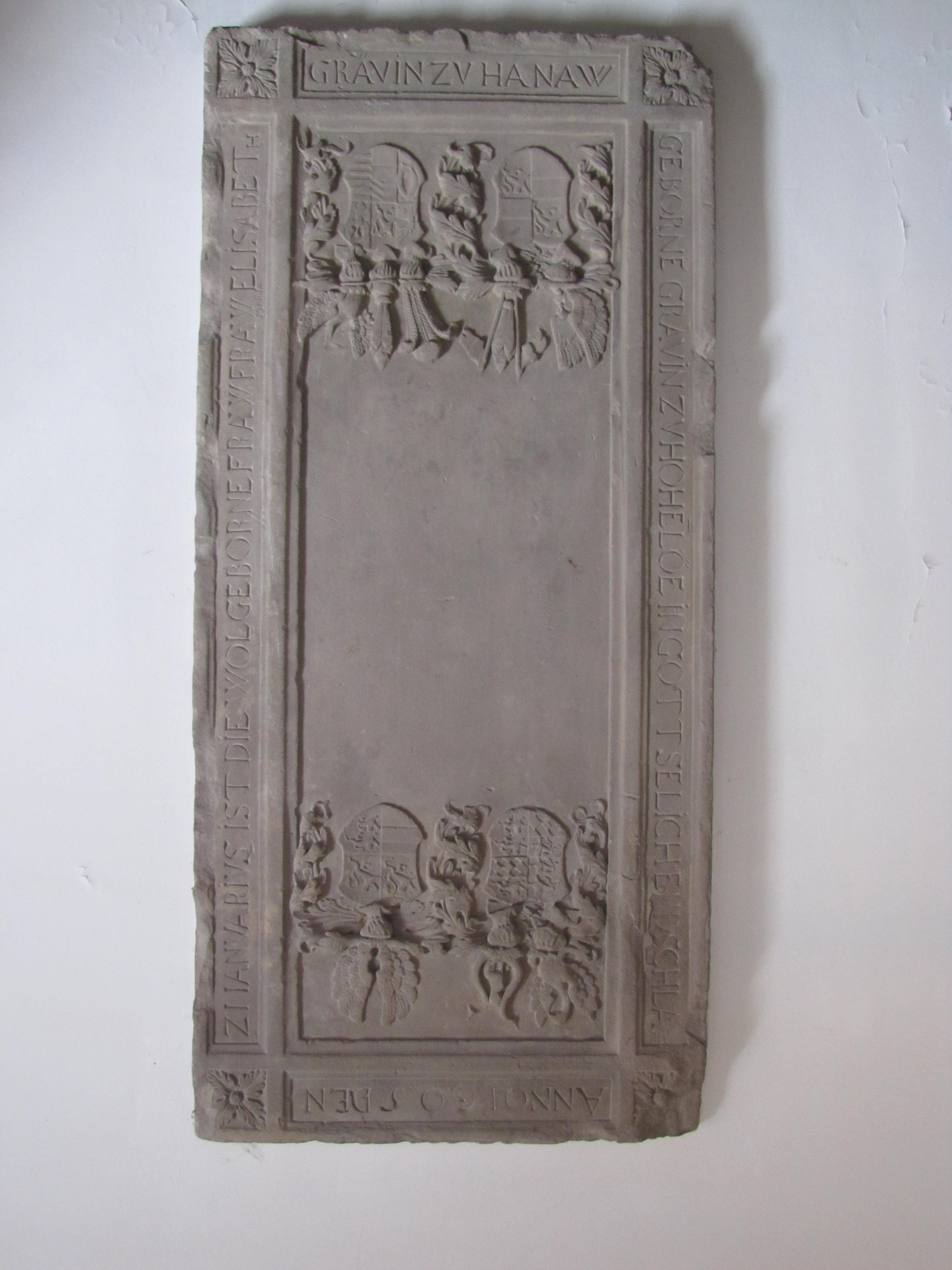 Alsace, Bas-Rhin, Église protestante de Bouxwiller (PA00084645, IA67009578). Pierre tombale de Maria Elisabeth Comtesse de Hanau-Lichtenberg, née Comtesse de Hohenlohe (1576-1605)